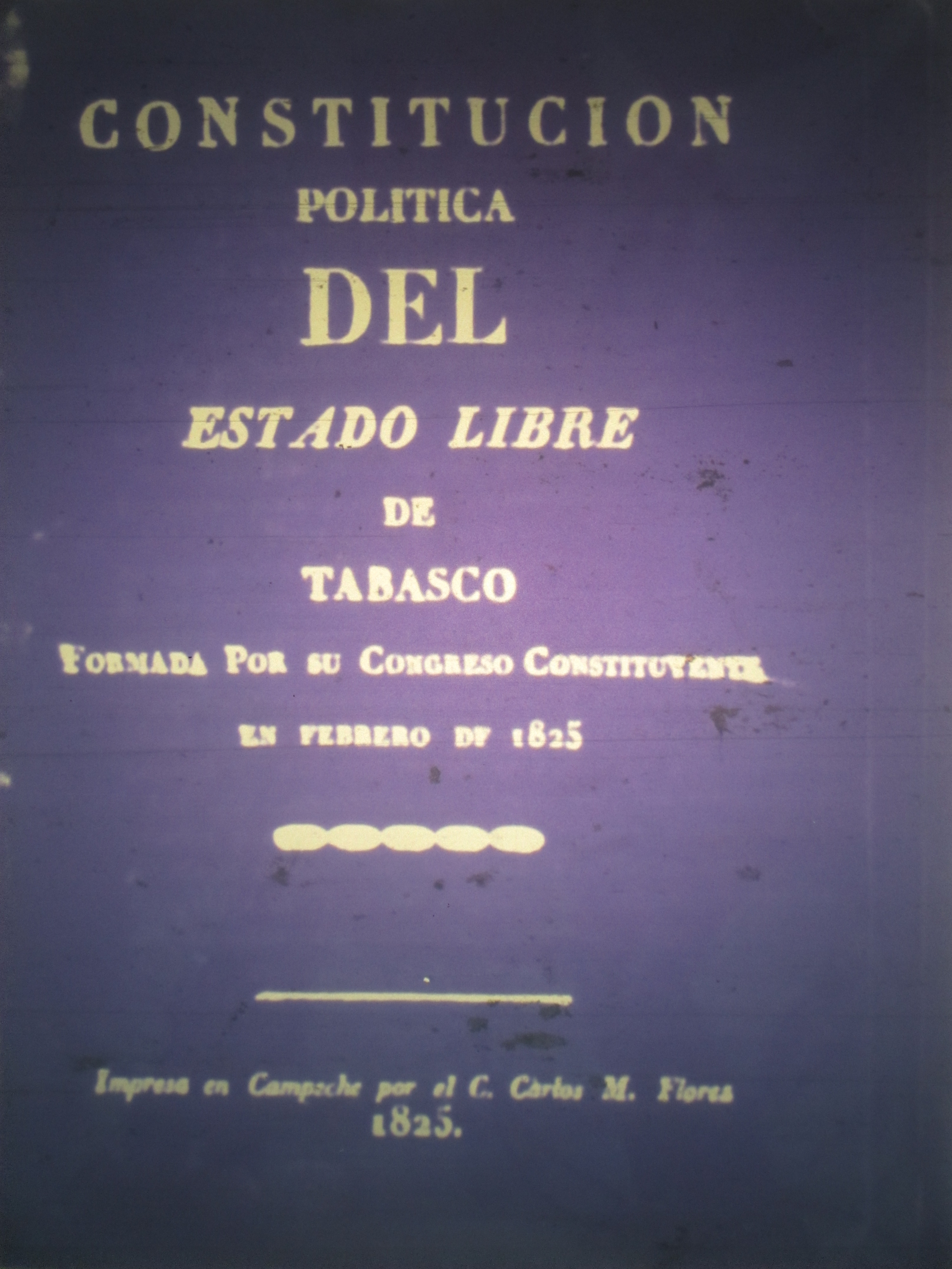 Portada de la Constitución local redactada por el primer congreso Constituyente del Estado de Tabasco, el 5 de febrero de 1825 y promulgada por el gobernador interino Pedro Pérez Medina el 26 de febrero del mismo año. La Constitución constaba de 11 capítulos y 224 artículos. Tabasco fue el cuarto estado en contar con una Constitución local, después de los estados de Jalisco, Oaxaca y Zacatecas.